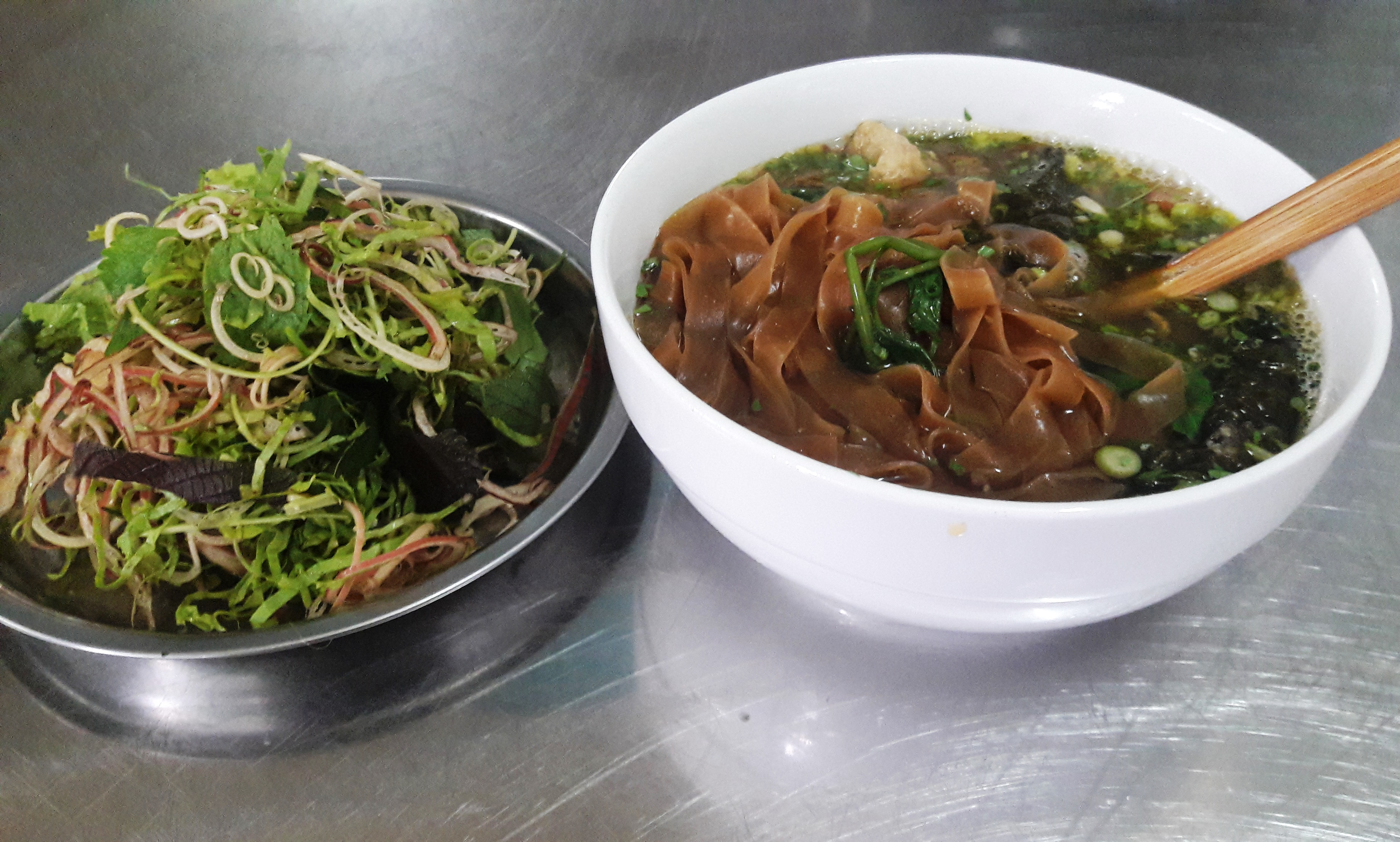 Cuisine of Vietnam